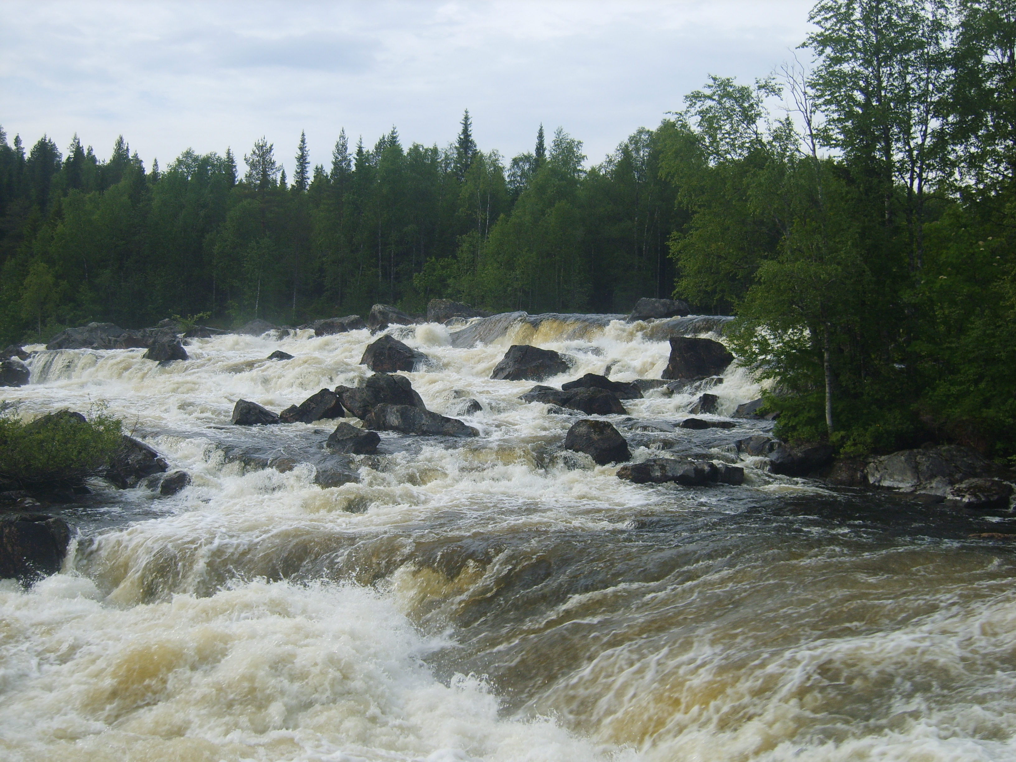 Водопад Киваккакоски (Киваккский порог), река Оуланкайоки (также Оуланка-йоки, Оуланкаёки, Оуланка, Оланка). Паанаярви (национальный парк).